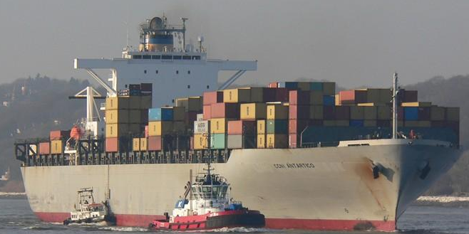 CCNI Antartico